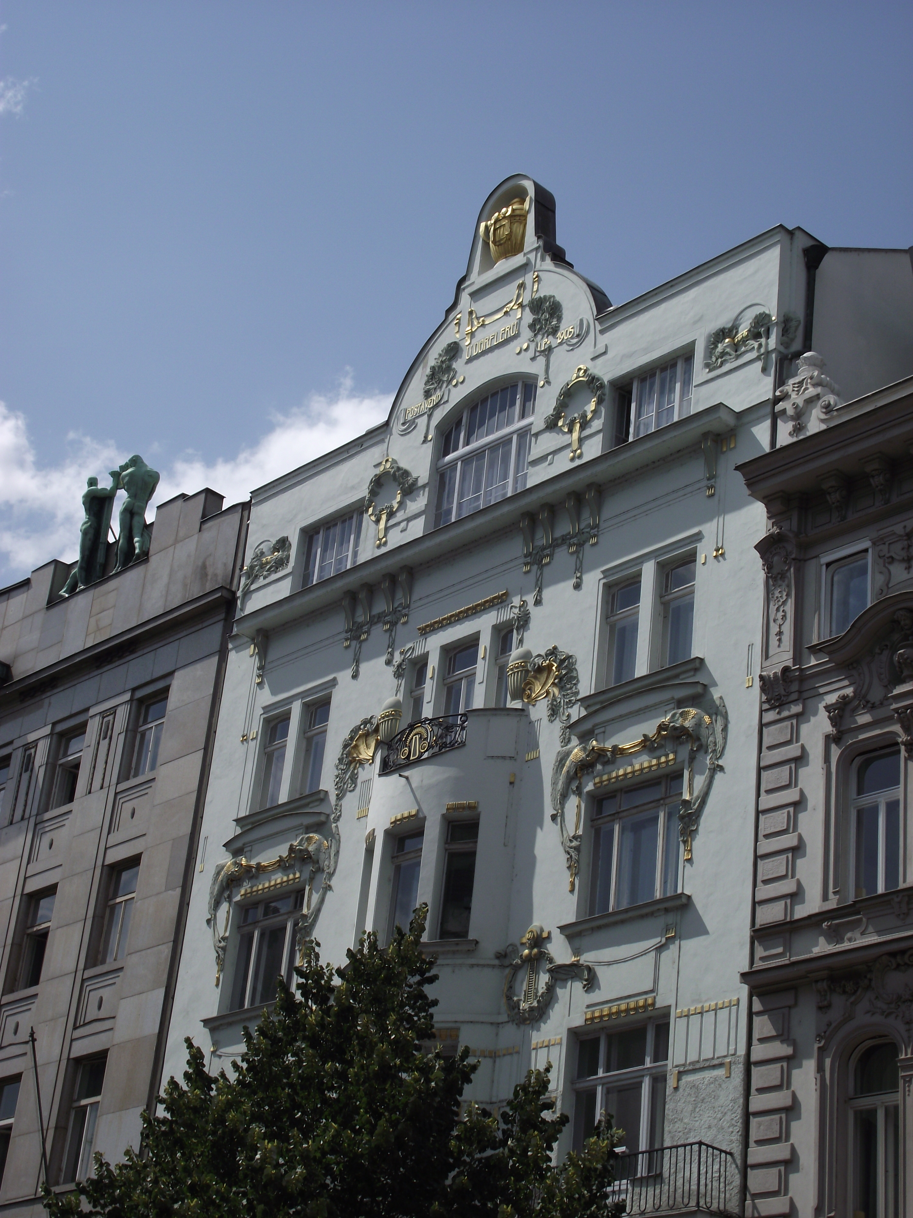 Nové Město. Na příkopě Viennese Secession's Dörfler House. Arch. Matěj Blecha 1905